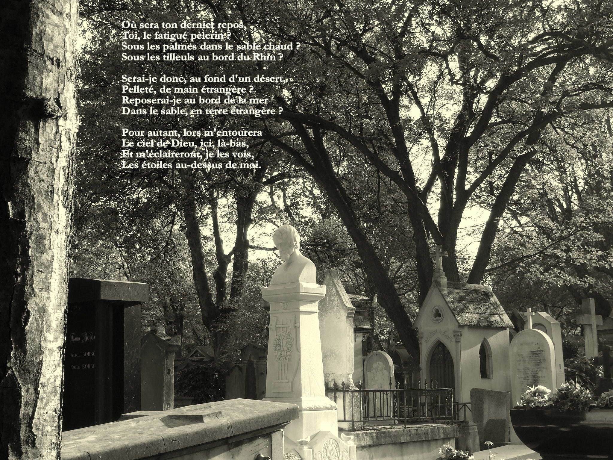 Cimetière de Montmartre, Av. Hector Berlioz, division 27 ; photo et traduction, d'après le poème "Wo ?" (Où ?)